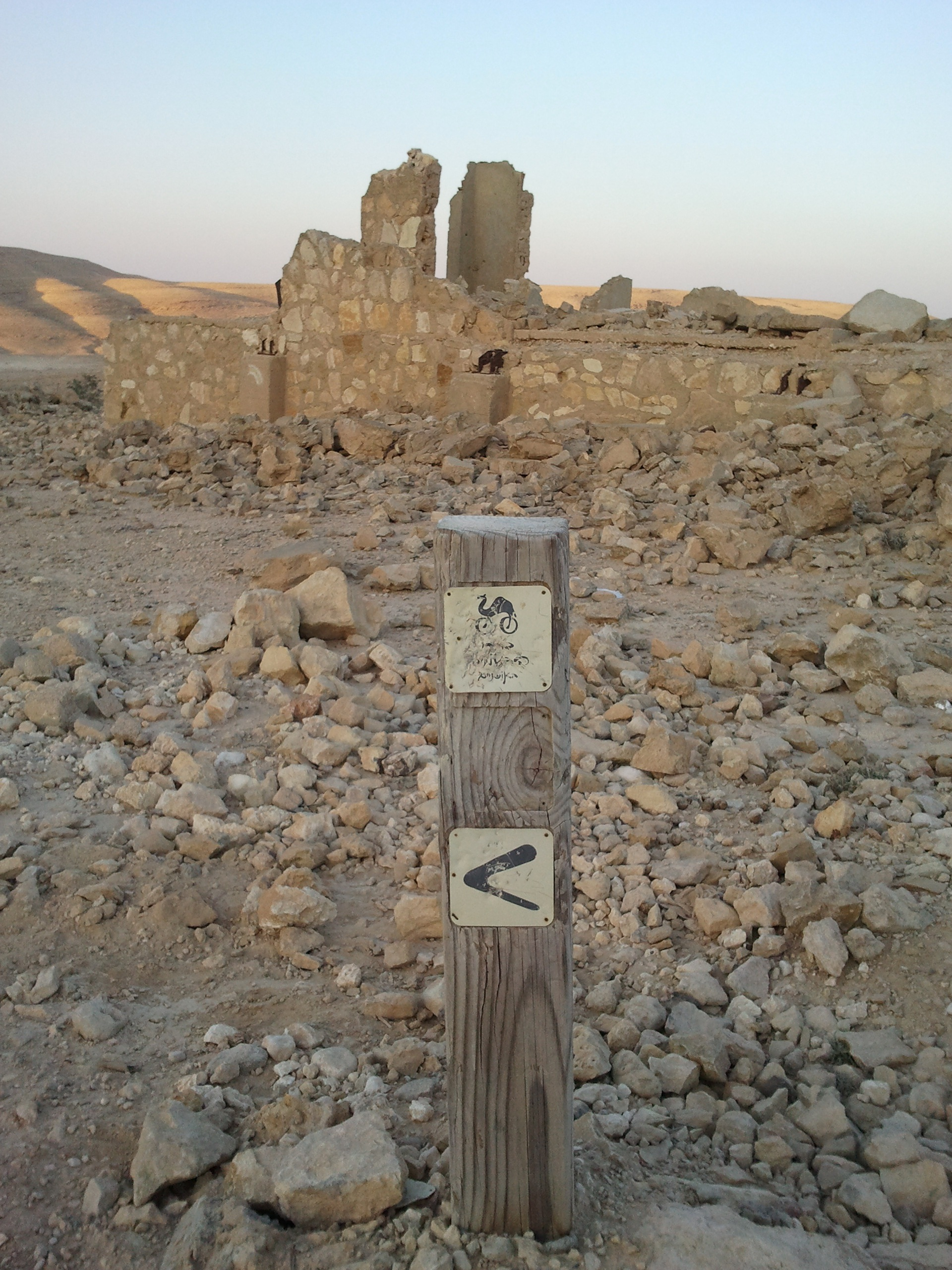 בסיס בטון למגדל קידוח נפט. נמצא על קטע דרך סולינג בריטית למחפשי הנפט אשר הגיעו ממחנה מחפשי הנפט ליד הר אבנון.